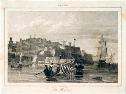 Vue depuis la mer, de la cité portuaire de La Valette, île de Malte, par Augustin François Lemaître (1797-1870)